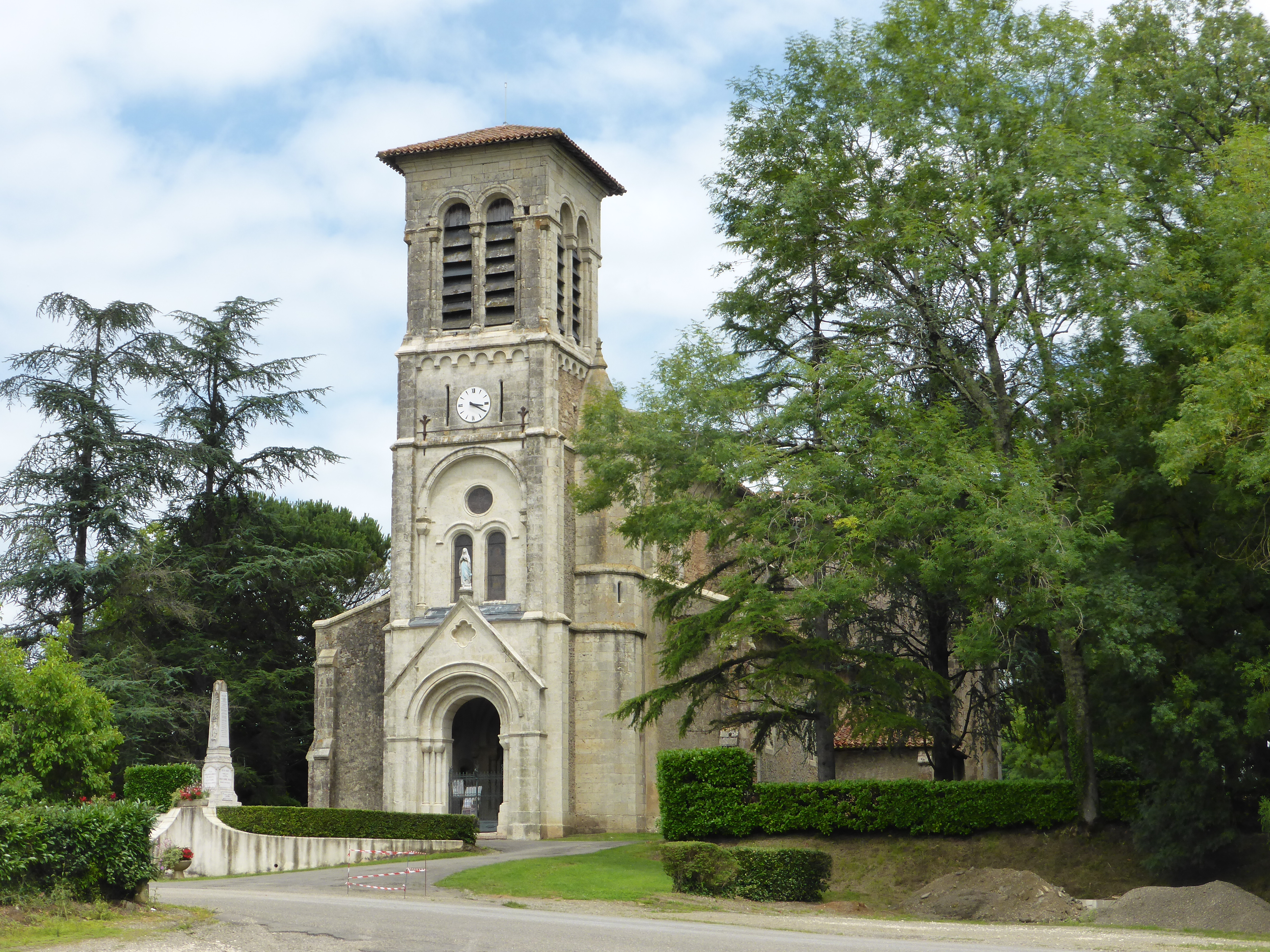 Église Notre-Dame d'Estang, dans le Gers.